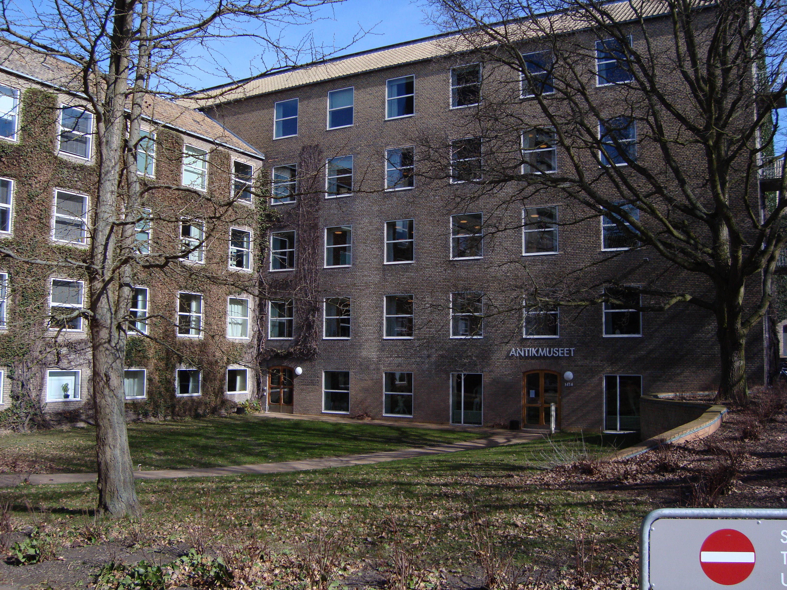 Antikmuseet i Århus